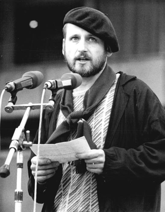 ADN-ZB Link 4.11.89 Berlin: Demonstration 500.000 Bürger beteiligten sich an einer Demonstration für den Inhalt der Artikel 27 und 28 der Verfassung der DDR. Auf dem anschließenden Meeting auf dem Alexanderplatz ergriff auch der Student Roland Freitag von der Humboldt-Universität das Wort.